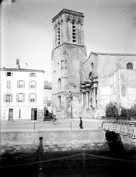 Fonds Trutat - Photographie ancienne Cote : TRU C 1550 Localisation : Fonds ancien (S 30) Original non communicable Titre : Eglise Saint-Sauveur, La Rochelle, 22 septembre 1907 Auteur : Trutat, Eugène Rôle de l’auteur : Photographe Lieu de création : La Rochelle (Charente-Maritime) Date de création : 1907 Mesures : : 9 x 12 cm Observations : Note manuscrite de Trutat : " La Rochelle : église de St-Sauveur, , 22 septembre 1907, Goerz-Anschutz, Jougla " Mot(s)-clé(s) : -- Architecture religieuse -- Eglise -- Clocher -- Maison -- Pont -- Cycliste -- Poitou-Charentes (France) -- Charente-Maritime (Poitou-Charente) -- La Rochelle (Charente-Maritime) -- Eglise Saint-Sauveur (La Rochelle) -- 20e siècle, 1e quart -- 17e siècle Médium : Photographies -- Négatifs sur plaque de verre -- Noir et blanc -- Goerz-Anschutz -- Jougla-Lumière -- Vues d'architecture Bibliothèque de Toulouse. Domaine public